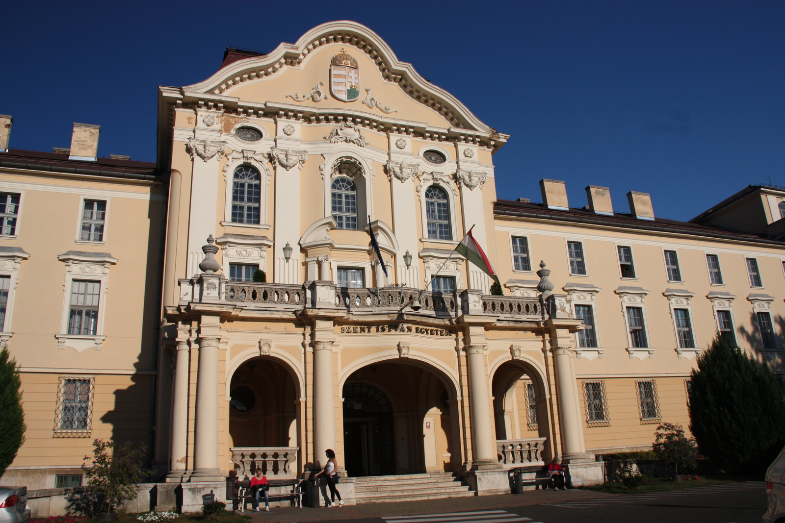 Szent István Egyetem főépülete (egykori premontrei gimnázium, rendház és kollégium) (Gödöllő, Páter Károly u. 1.) This is a photo of a monument in Hungary, Identifier: 15414